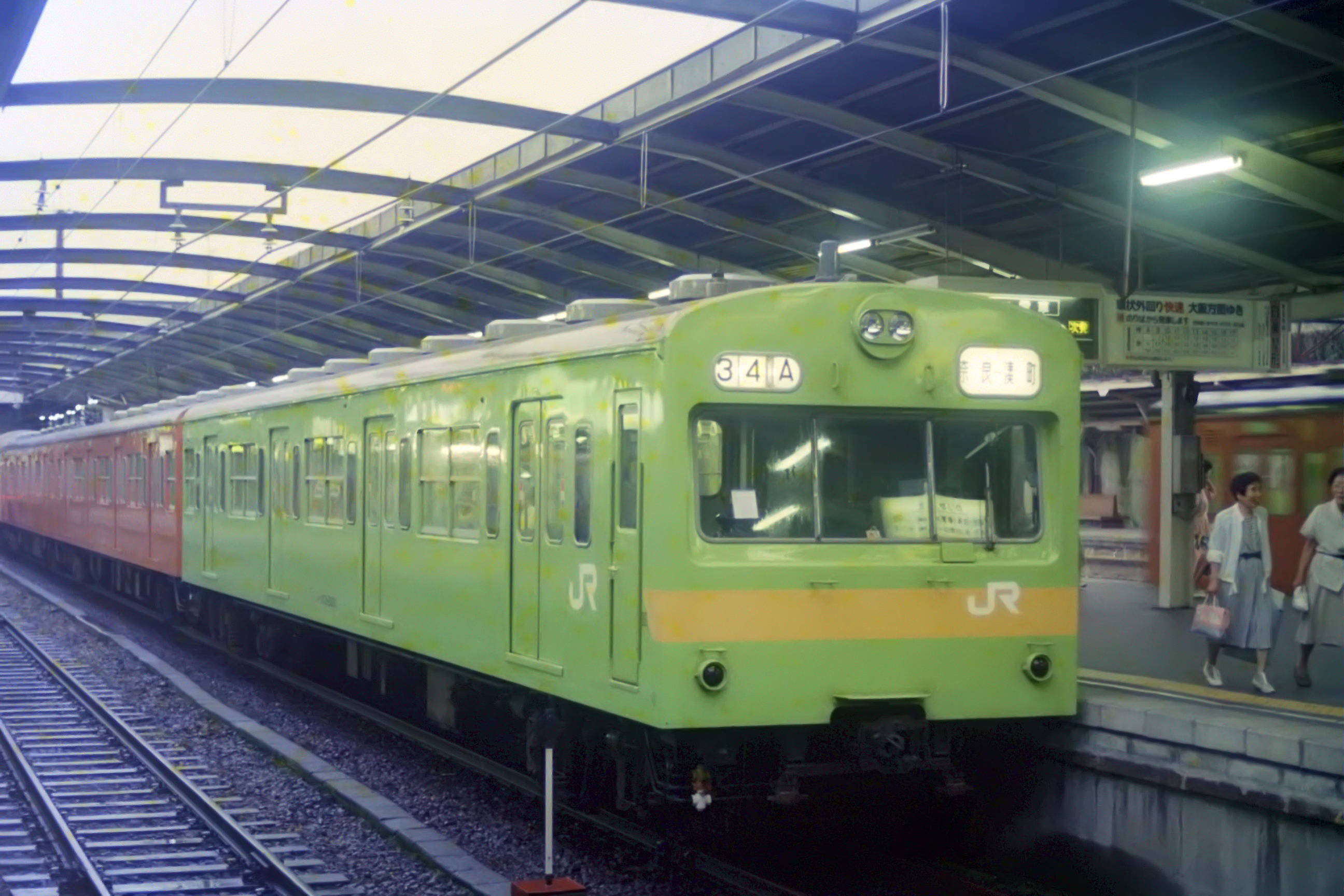 クハ103-2001 1987年8月 天王寺駅